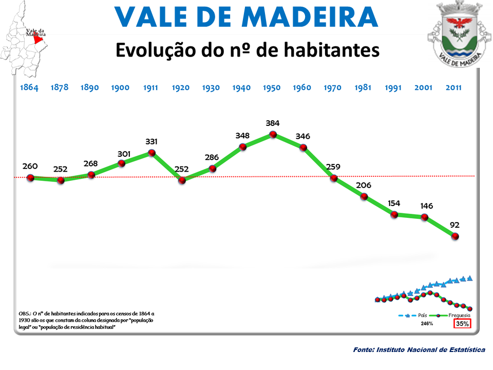 Censo 1864/2011